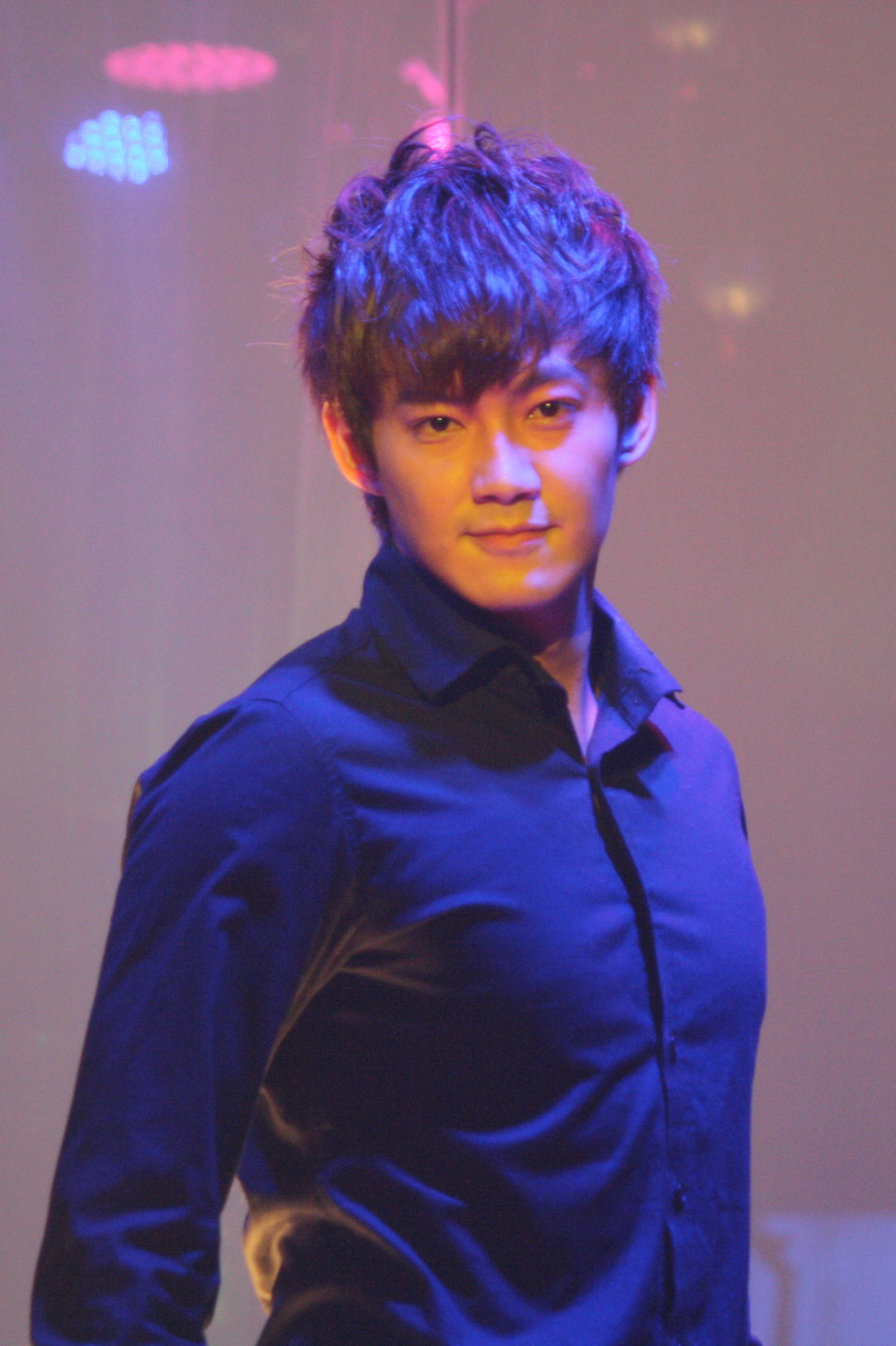 20130517 佛山軒尼詩活動